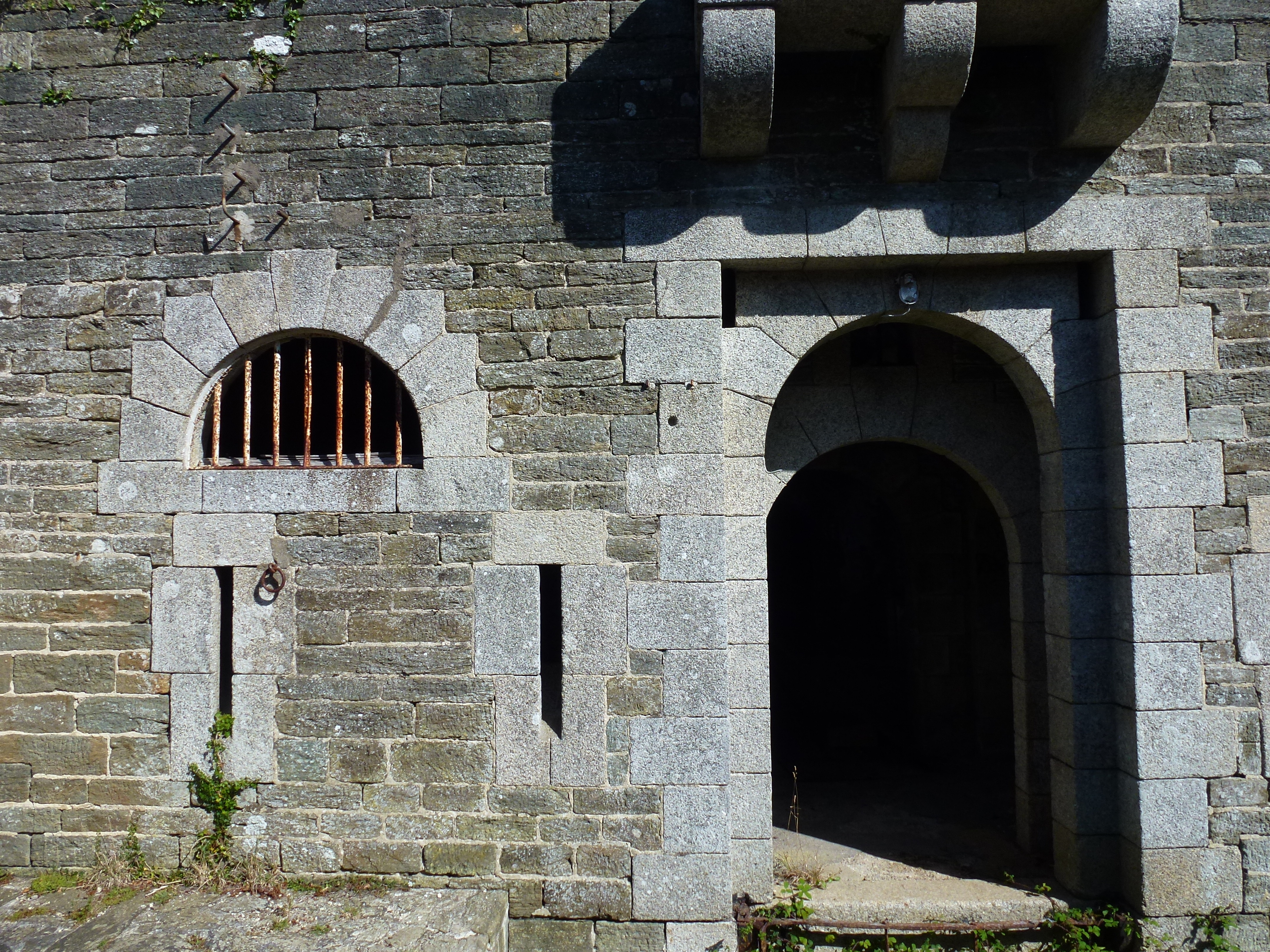 l'Île de Groix dans le Morbihan